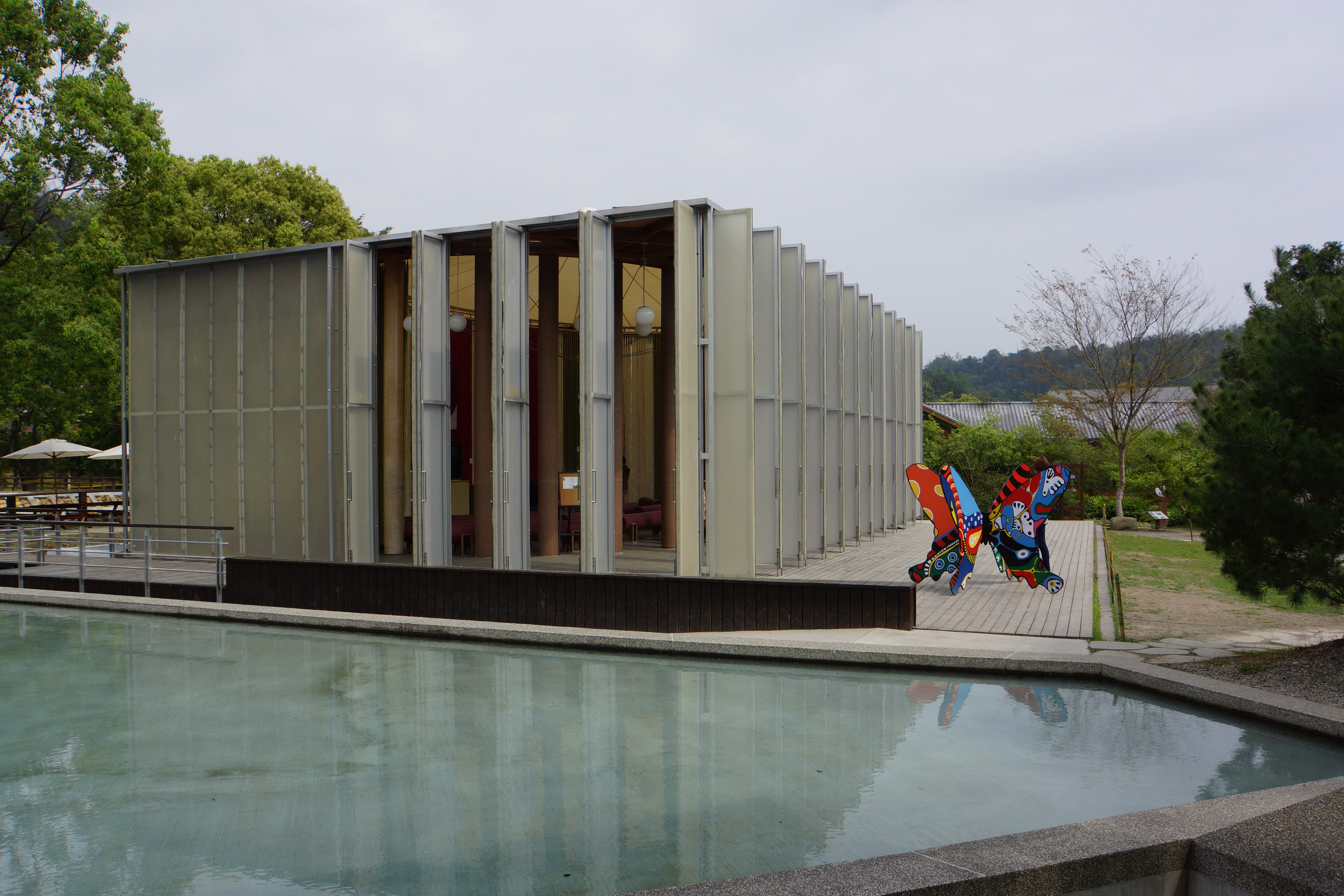 紙教堂 Paper Dome